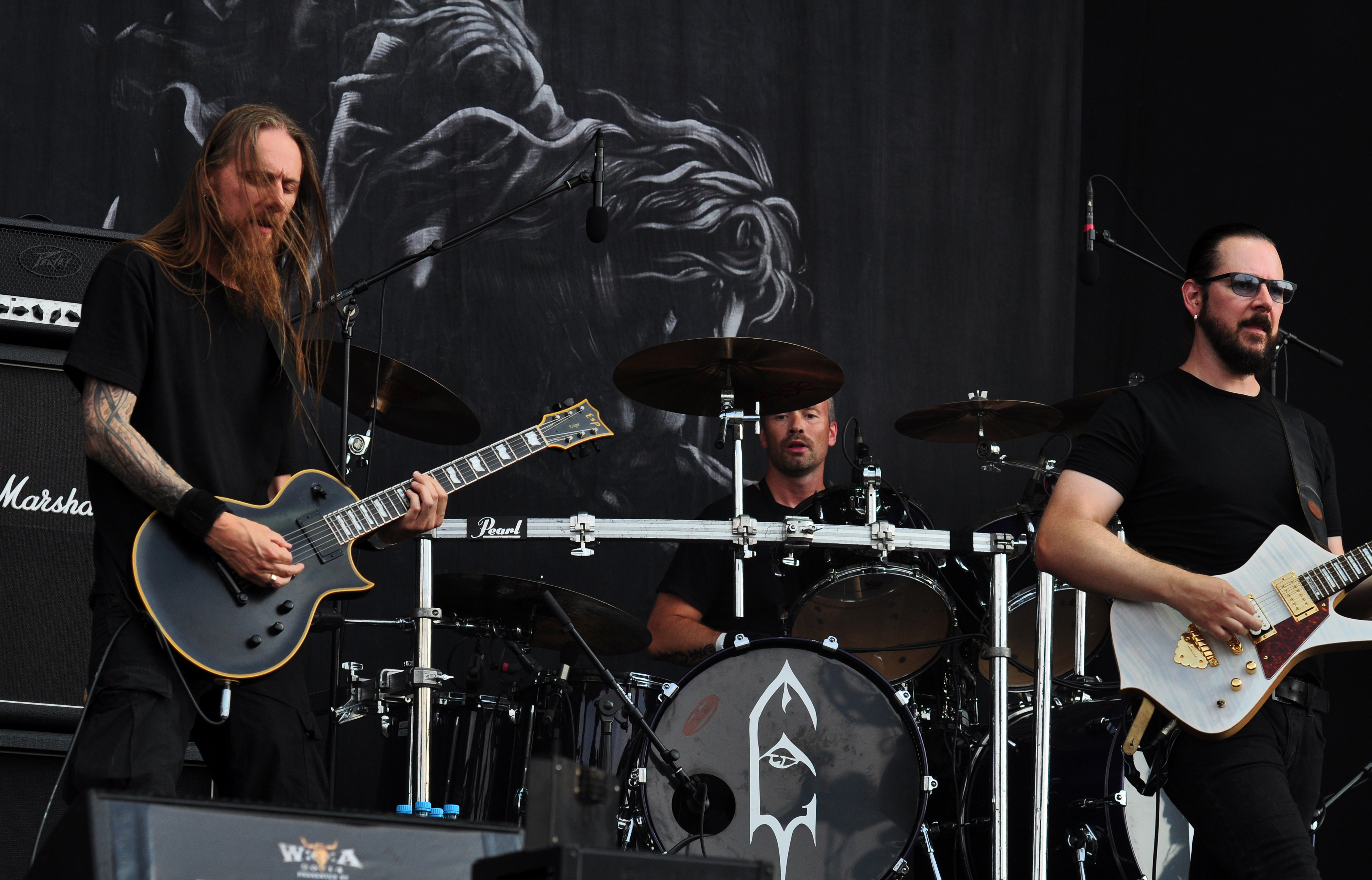 02-08-2014-Emperor at Wacken Open Air 2014-JonasR 09